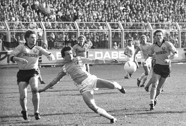 ADN-ZB-Thieme- 29.10.88-Karl-Marx-Stadt: Fußball-FDGB-Pokal- FC Karl-Marx-Stadt - Dynamo Dresden 2:1 n.V. (1:1), (1:1)- Hier kann sich der Karl-Marx-Städter Gerd Seifert (M.) gegen die Dynamospieler Matthias Döschner und Andreas Trautmann (r.) durchsetzen.